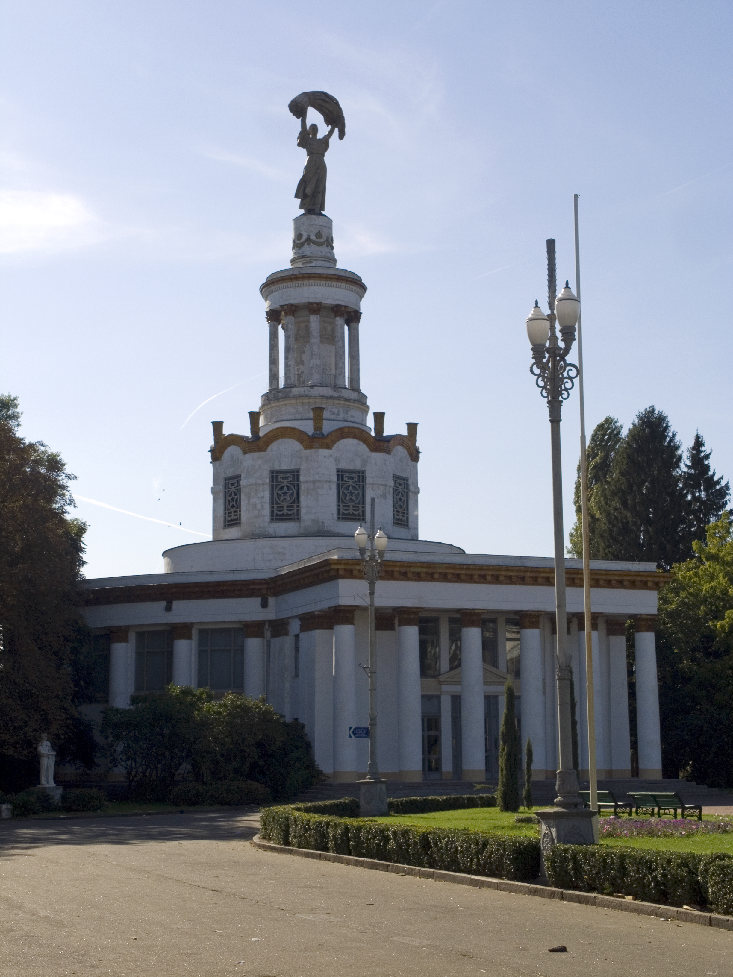 Україна, Київ - Виставка досягнень народного господарства УРСР - Павильон 10 "Зернові та олійні культури"